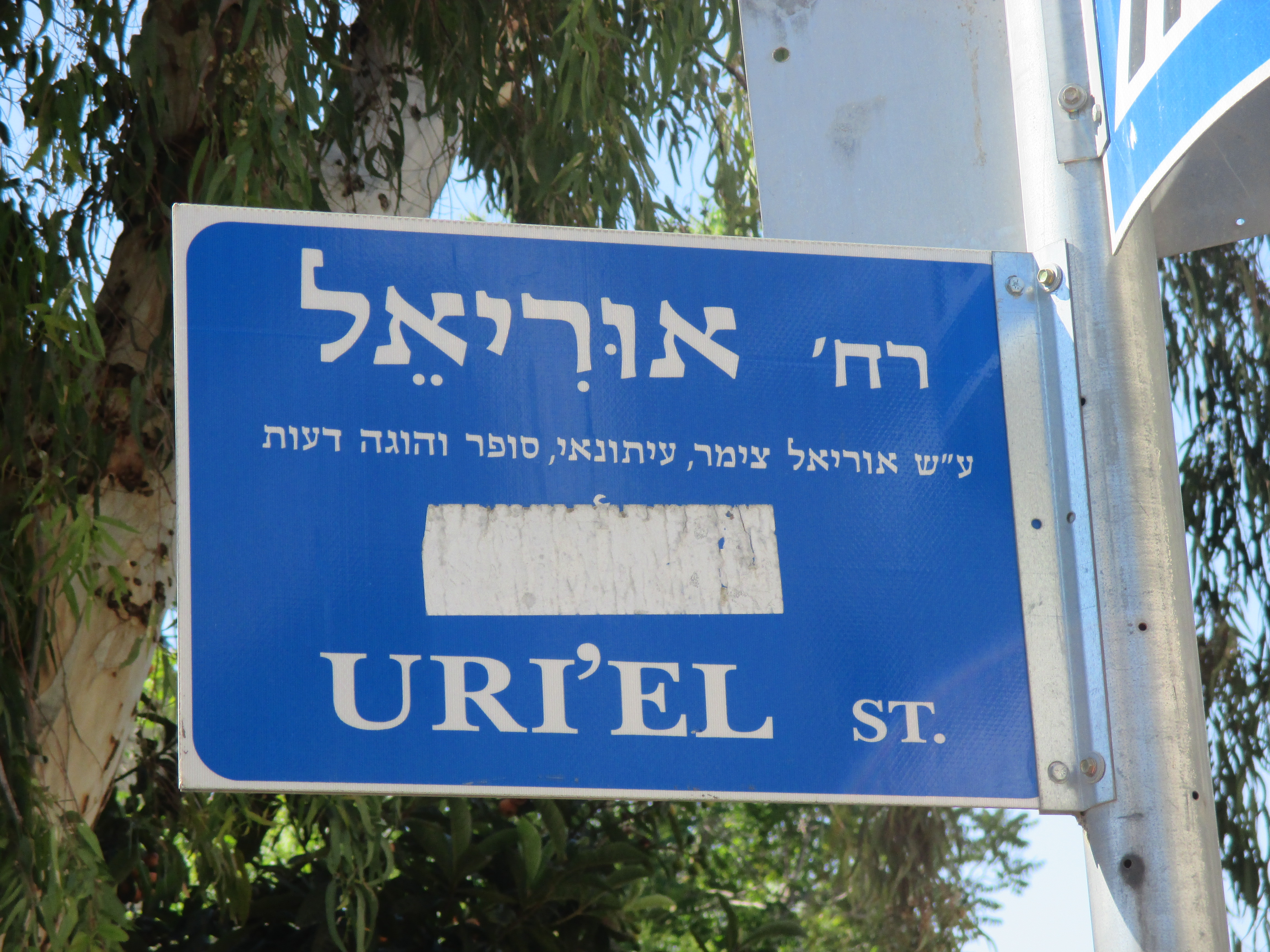 רחוב אוריאל בשכונת סנהדריה בירושלים